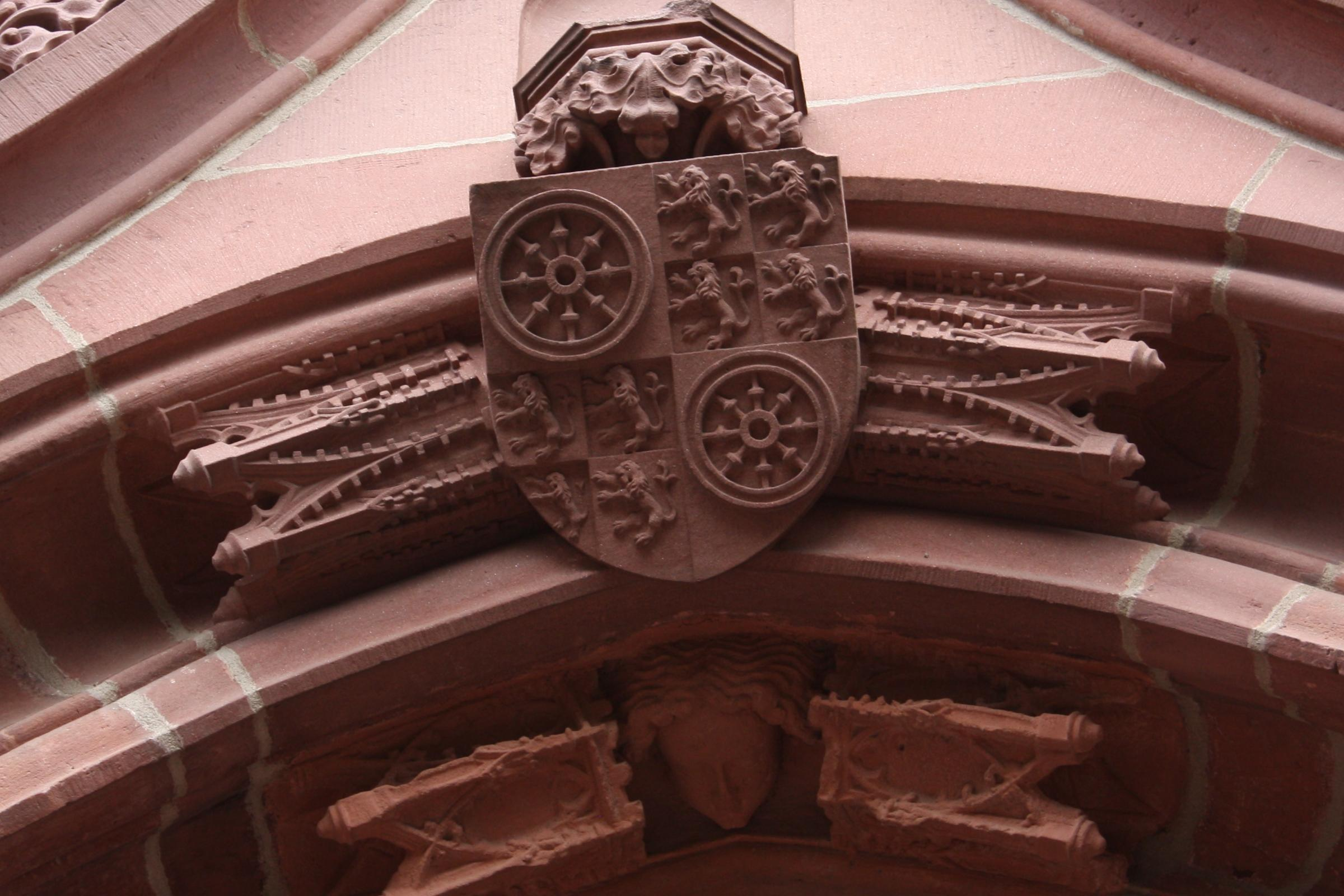 Wappen des Mainzer Erzbischof Konrad III. von Dhaun am Portal der Kirche in Eltville, Rheingau, Hessen.